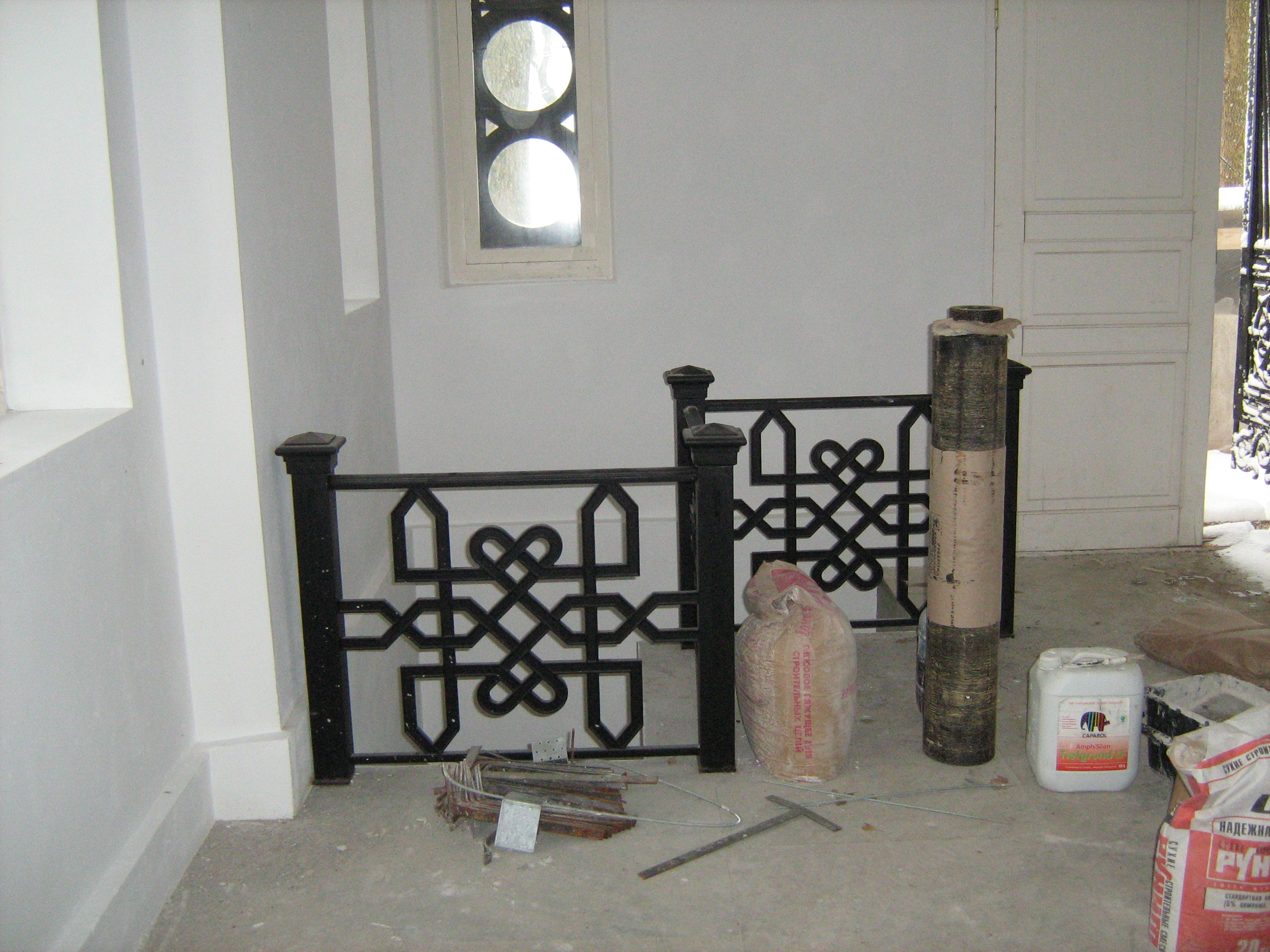 г.Пушкин(Царское Село)Казанское клабище.Часовня-усыпальница Юрьевских.Молельня.Решетка лестницы в крипту.После реставрации